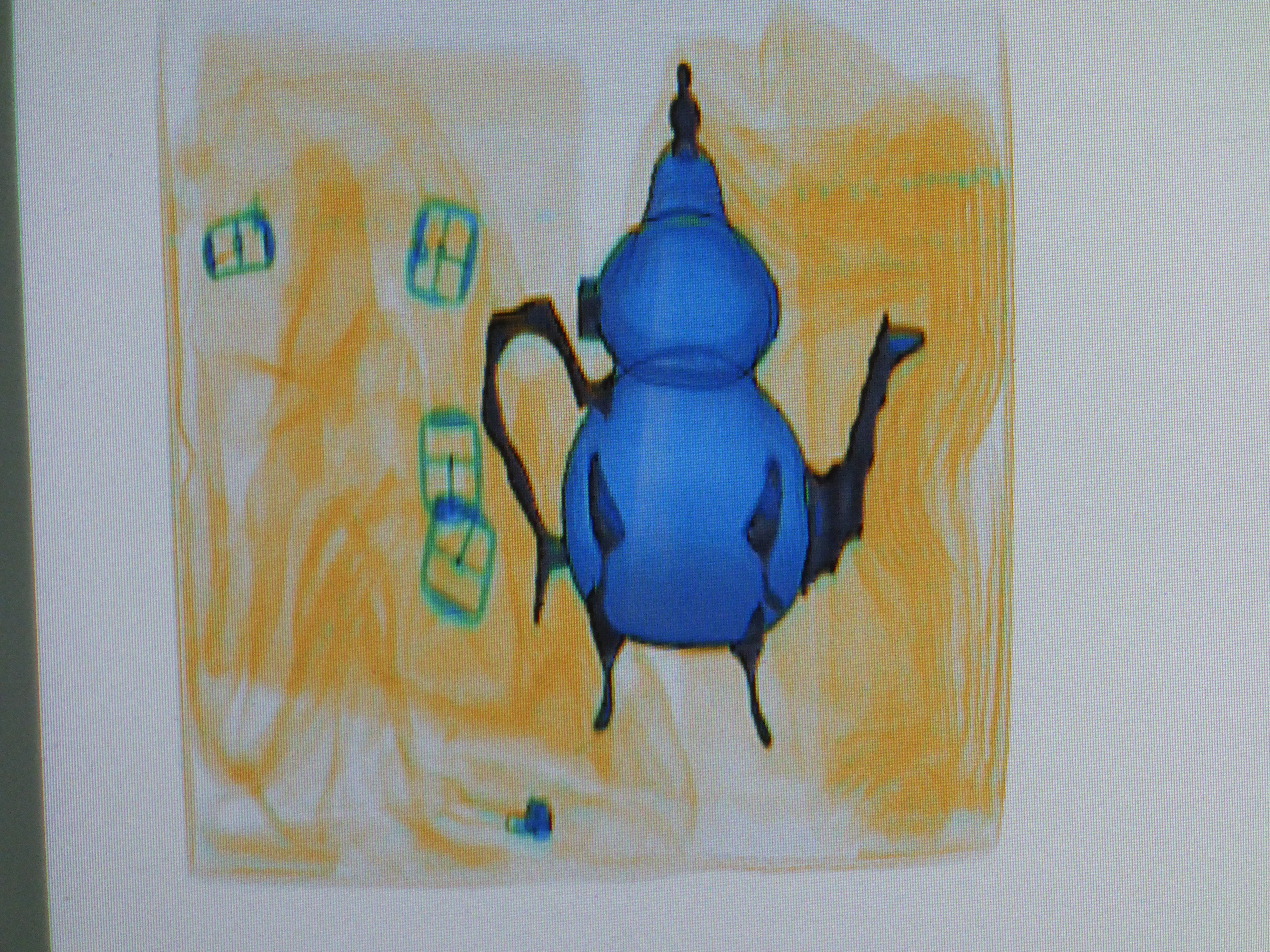 Figuras de una tetera marroquí metálica, y hebillas de una mochila bereber, tal como aparecen en la pantalla de un escáner para equipaje de mano (rayos X 90 KW, multienergía: orgánico e inorgánico). Detector de rayos X - escáner de alta energía, de la compañía Rapiscan. Equipo de inspección de paquetería situado en Madrid, España.